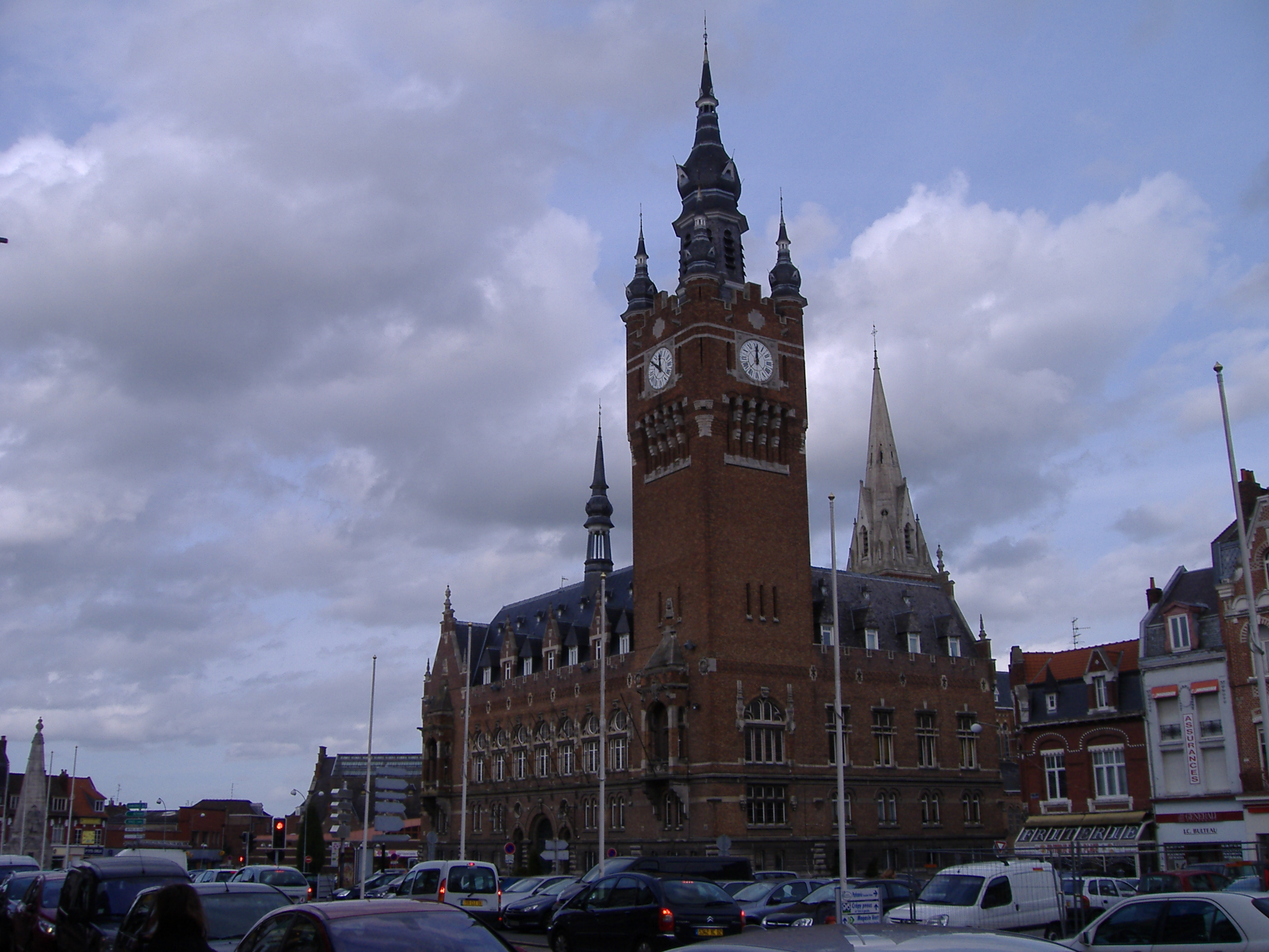 Vue de la tour du Beffroi de style flamand par la tranche, et du bâtiment attenant. Il est construit en brique d'un rouge foncé comme la majorité des édifices de la région des Flandres, mais aussi des Paus-Bas ou du Nord-Ouest de l'Allemagne (Hildesheim par exemple). Le ciel est gris et nuageux comme souvent ici, où comme le dit Brel les cathédrales sont les uniques montagnes, et celle-ci crève le ciel de son clocher.